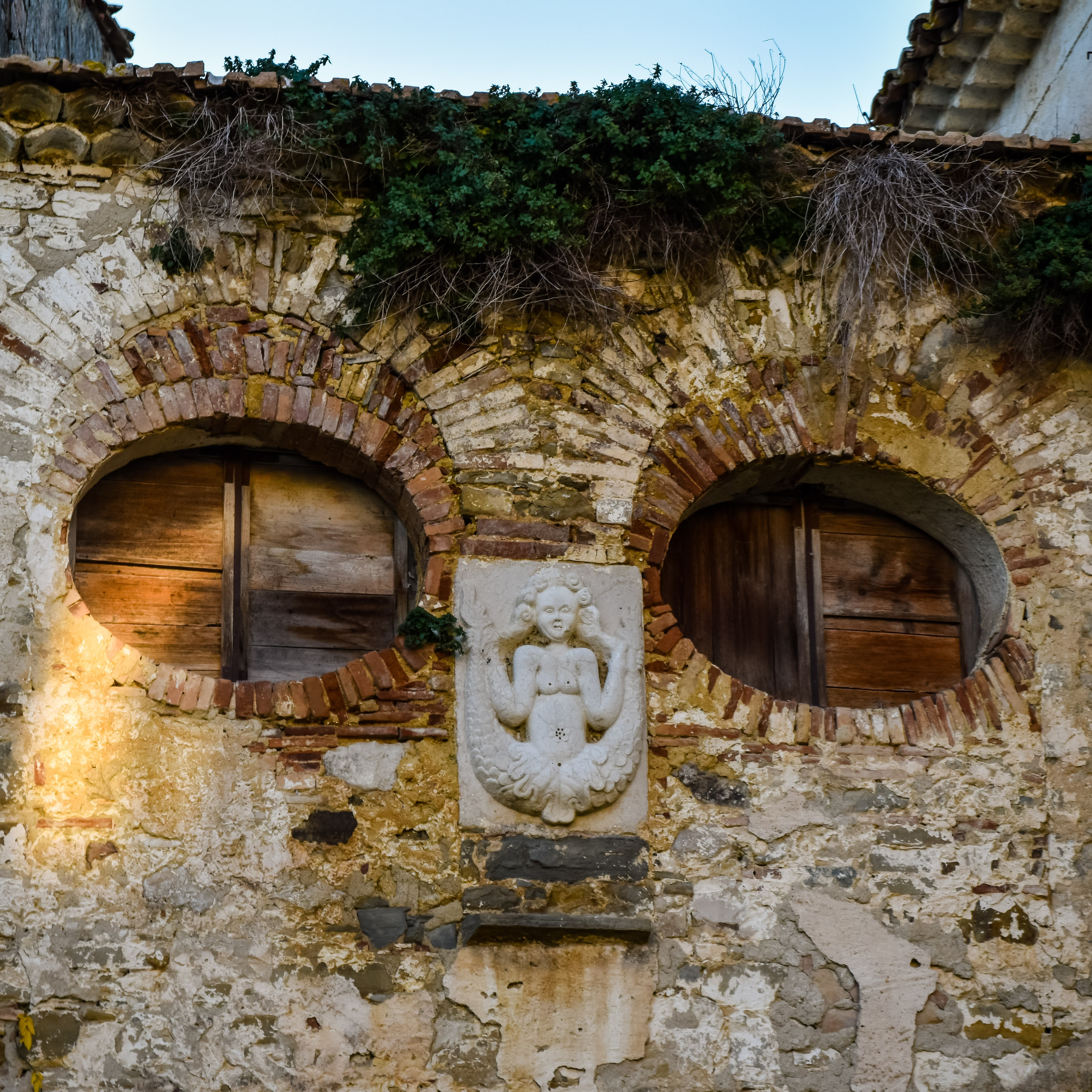 Bassorilievo di una sirena con due cose nel palazzo baronale di Spinete